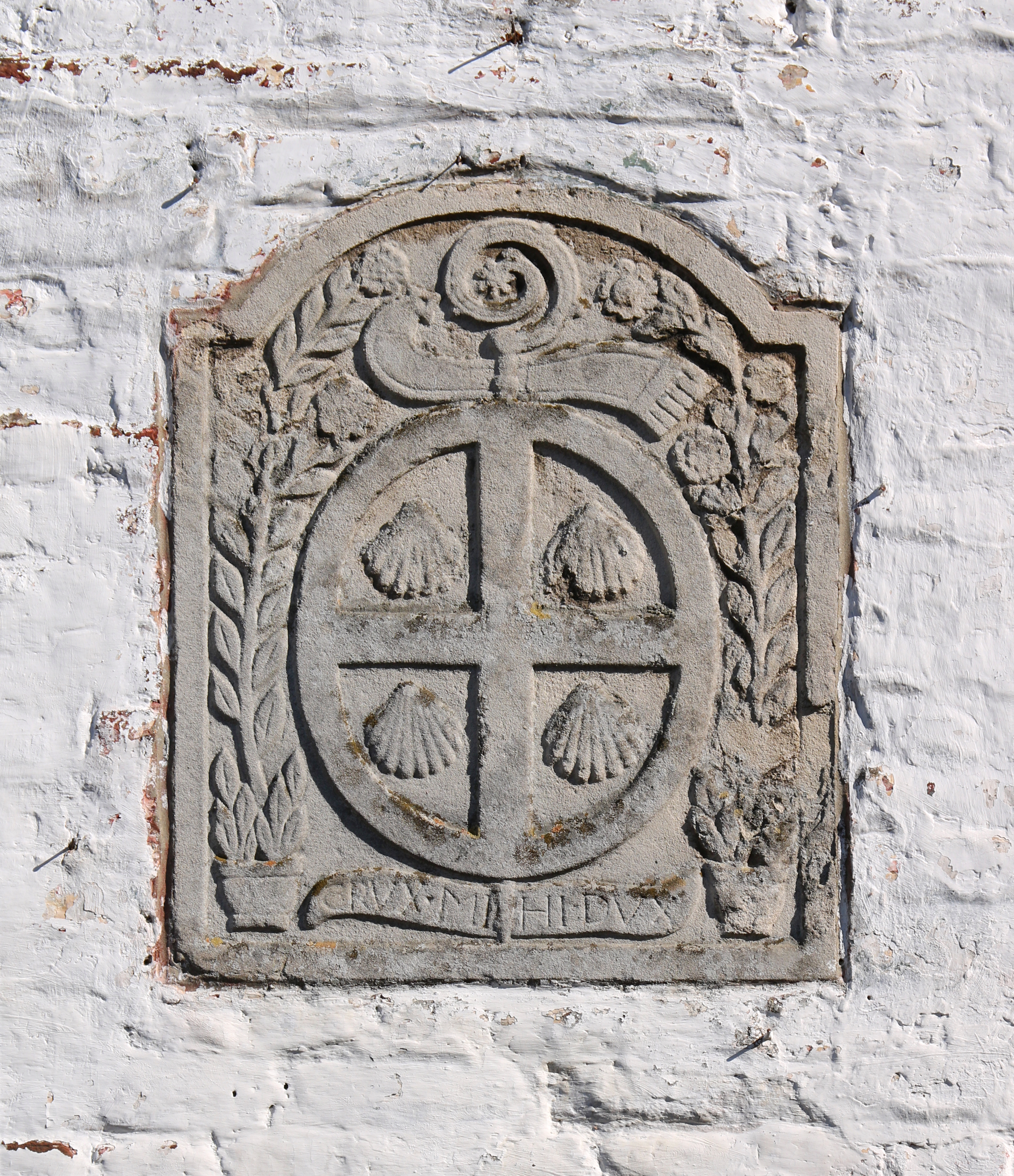 Belgique - Brabant wallon - Ottignies-Louvain-la-Neuve - Ferme du Biéreau